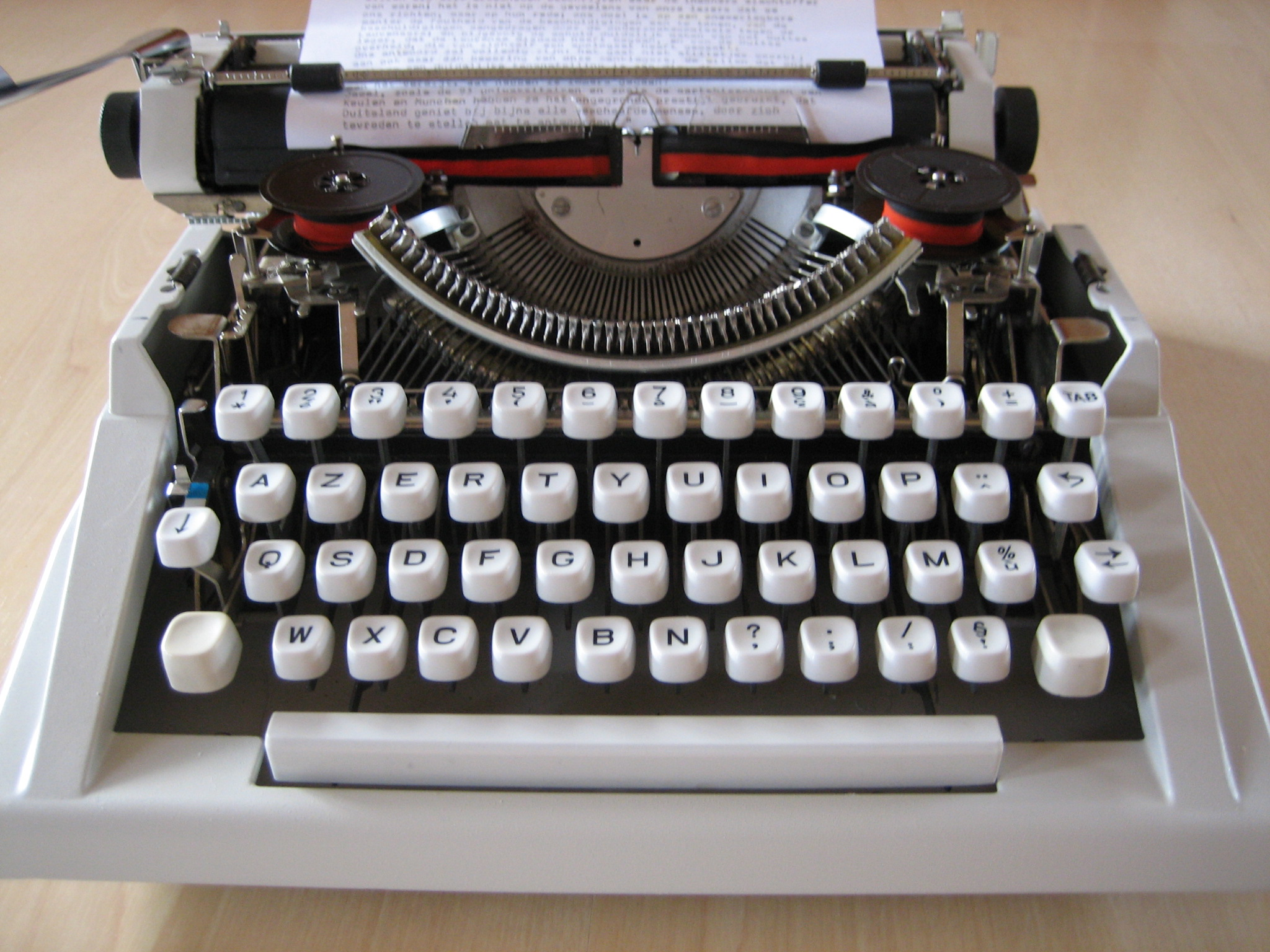 Een foto van een Hermes 3000 S-typemachine, waarvan de beschermkap verwijderd is.